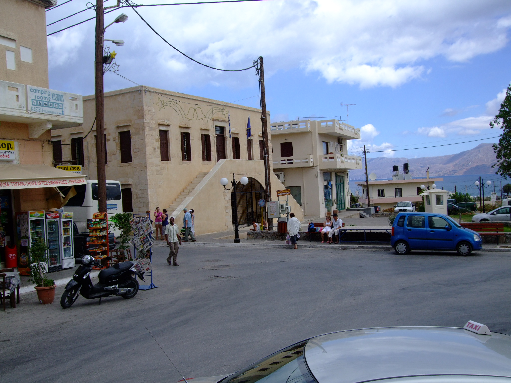 Muzeum Archeologiczne w Kissamos.